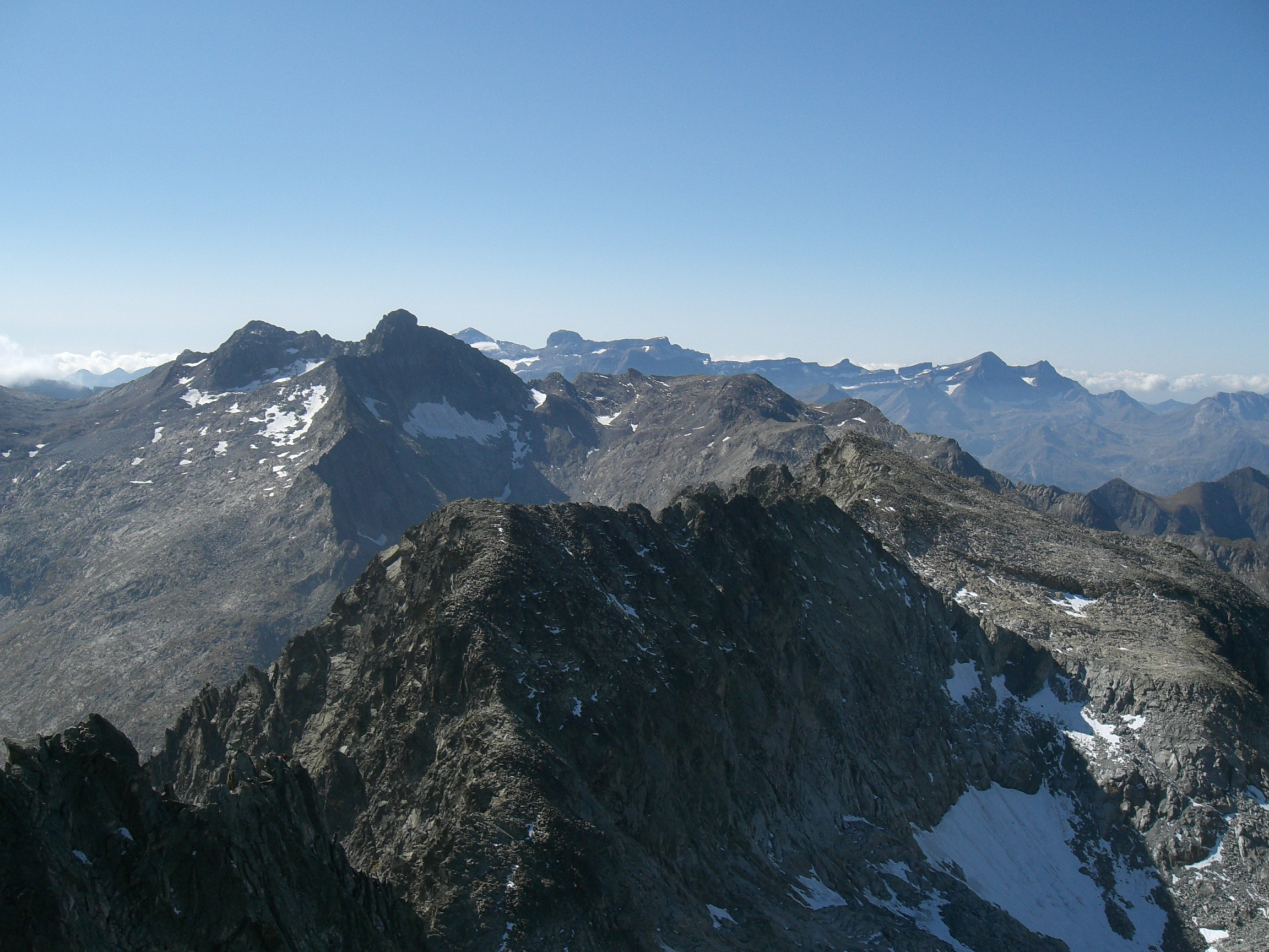 Vue du pic des Trois Conseillers (au premier plan).